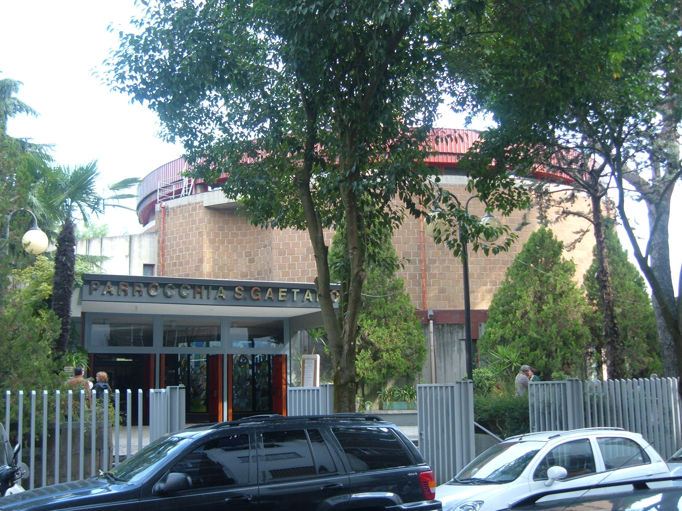 Chiesa parrocchiale di San Gaetano, a Roma, nel quartiere Tor di Quinto.